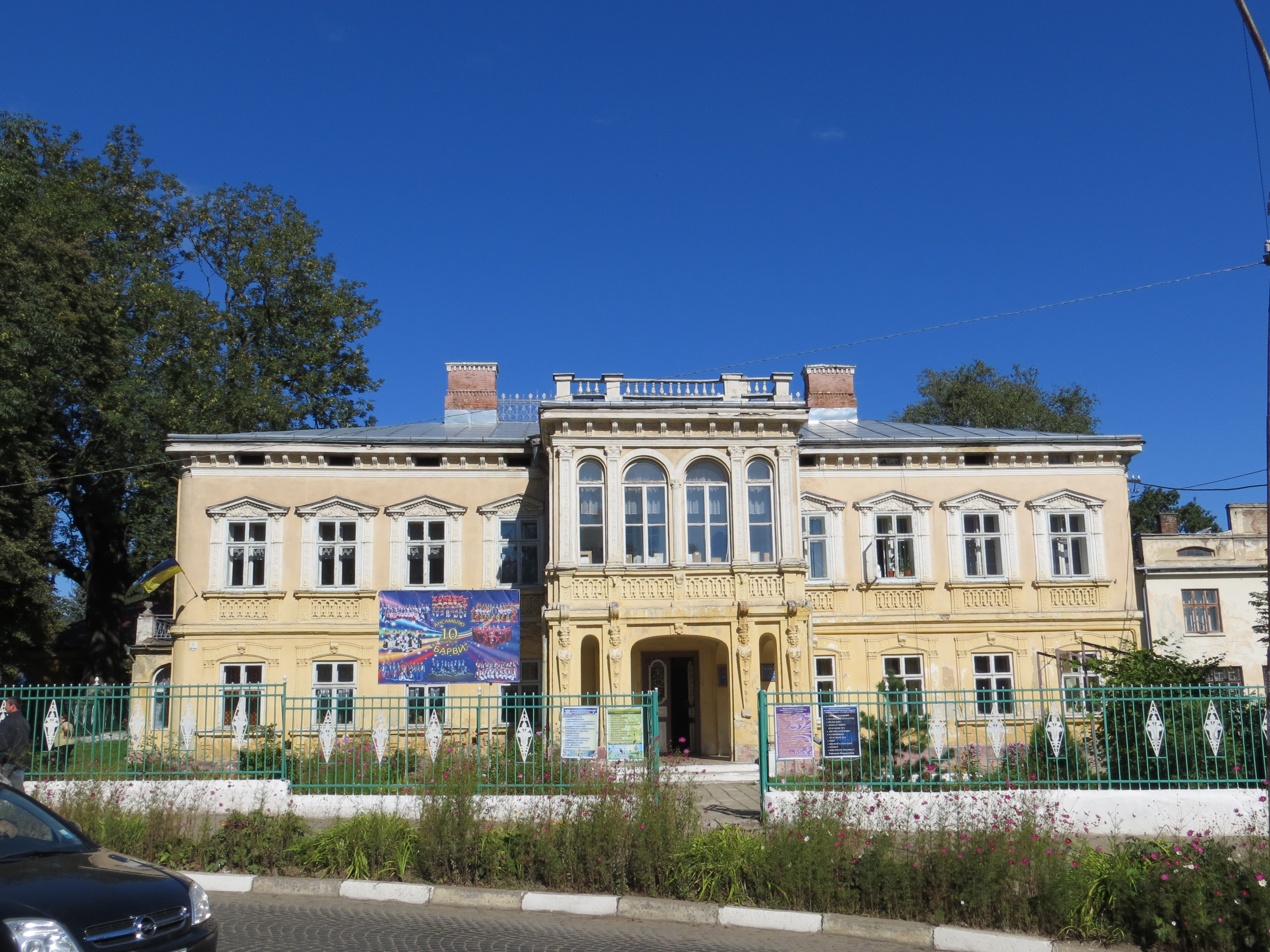 Вілла (мур.), Самбір, вул. Мазепи,7